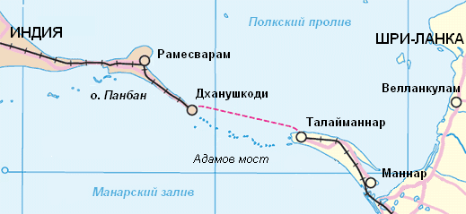 Адамов мост: карта-схема местности Адамов мост. Карта